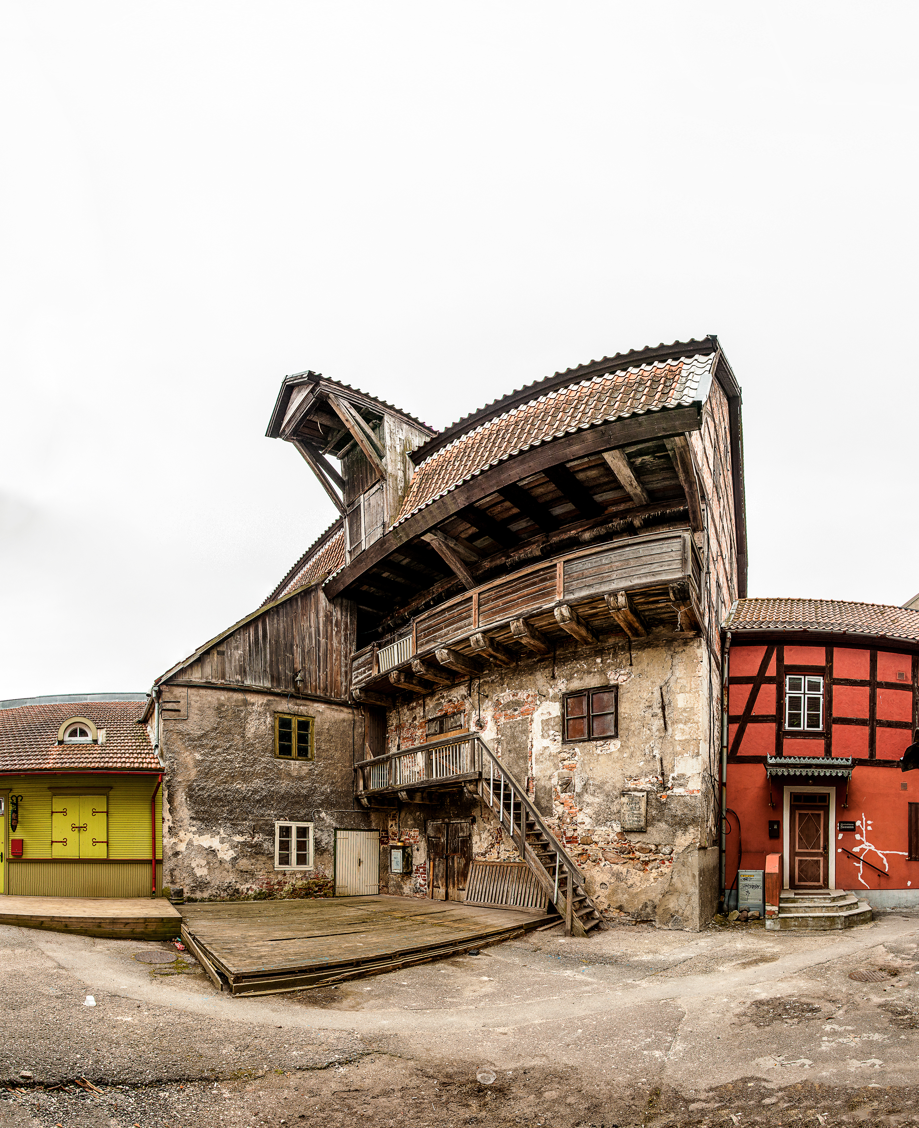 Ait Pärnus Rüütli t. 21